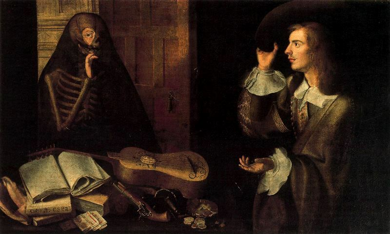 El caballero y la muerteThe Gentleman and Death